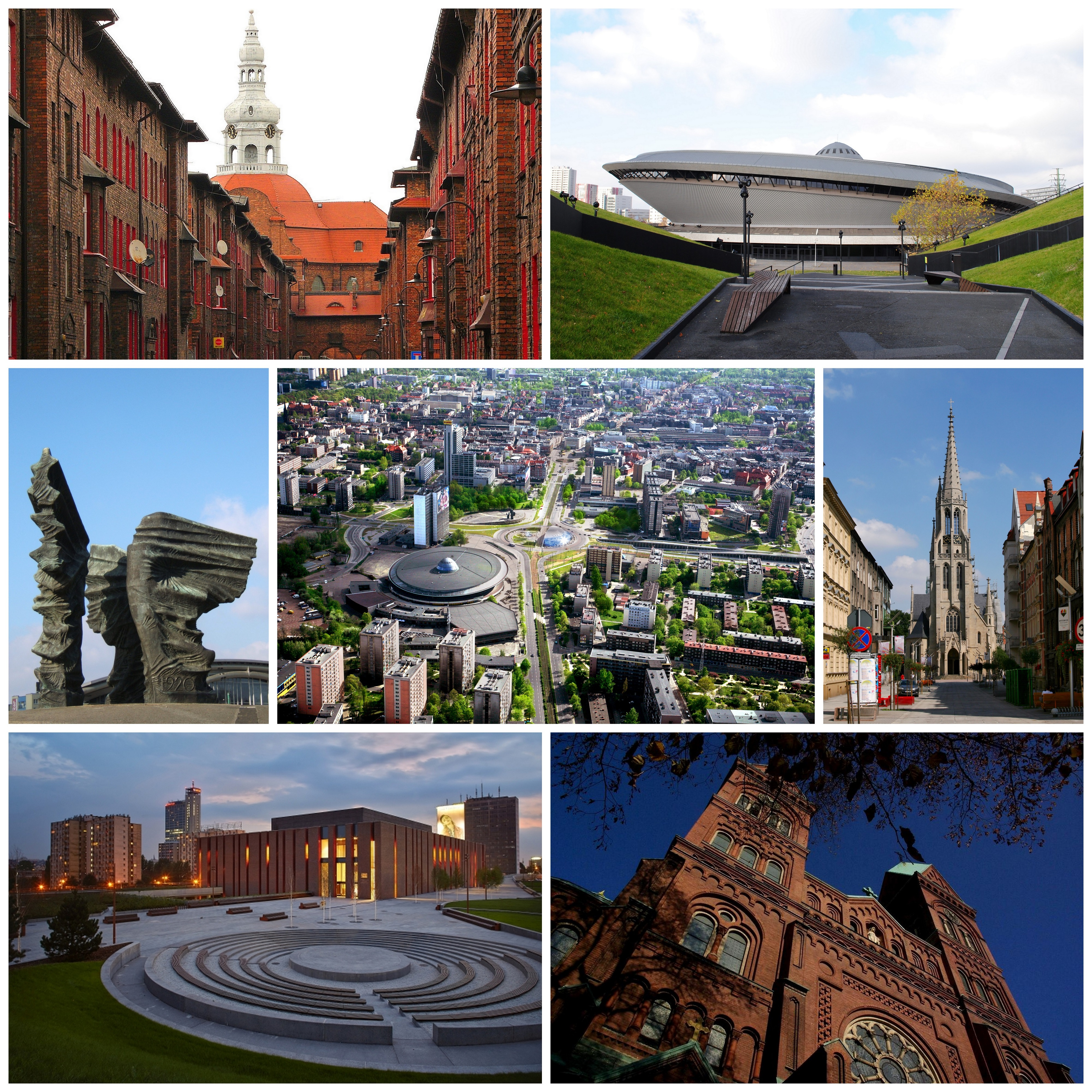 Zabytkowe osiedle Nikiszowiec, hala widowiskowo-sportowa Spodek, Pomnik Powstańców Śląskich, widok ogólny na centrum Katowic, Kościół Mariacki przy ul. Mariackiej, nowa siedziba NOSPR, bazylika w Panewnikach